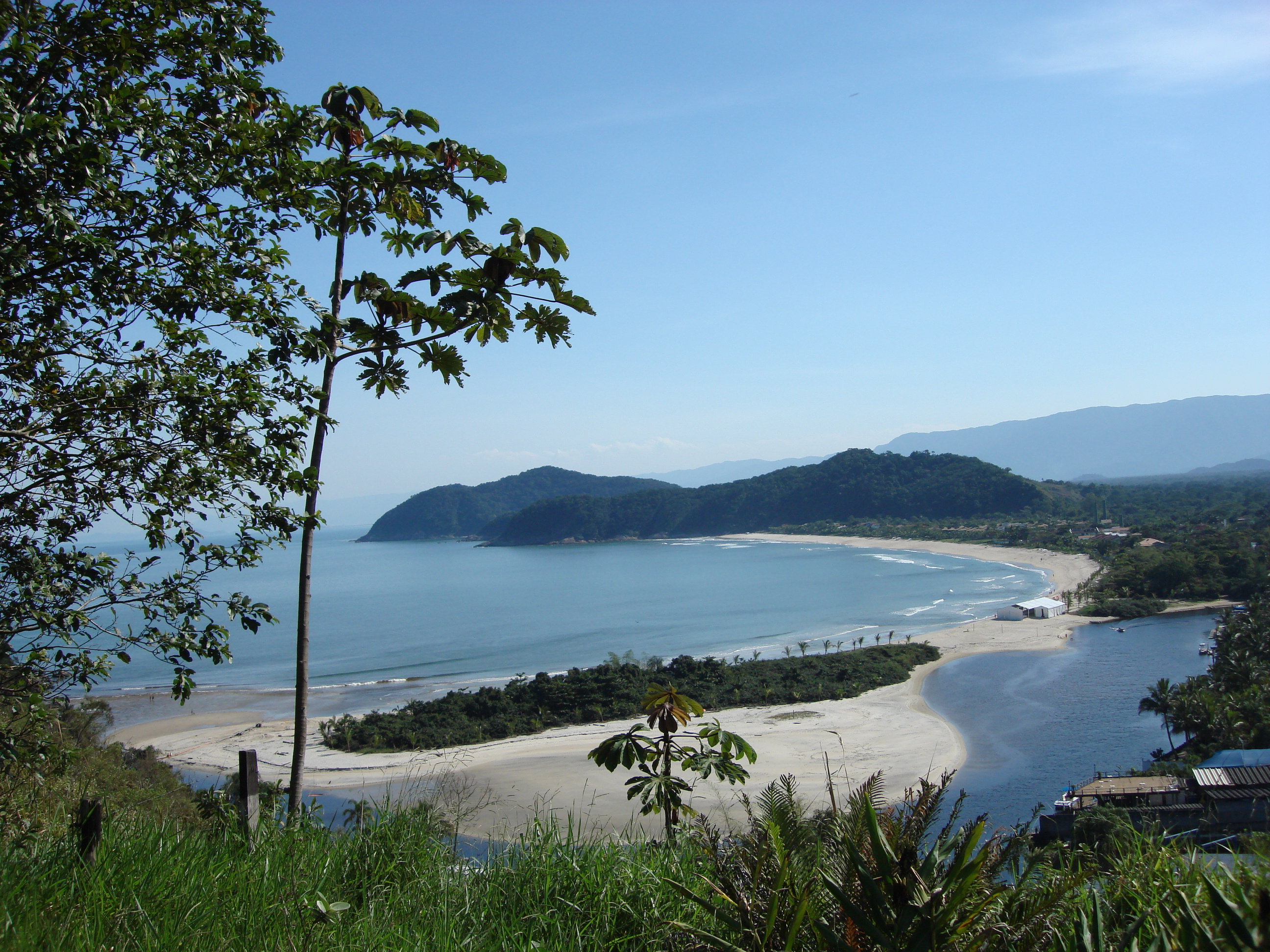 Barra do Una, São Paulo, Brasil